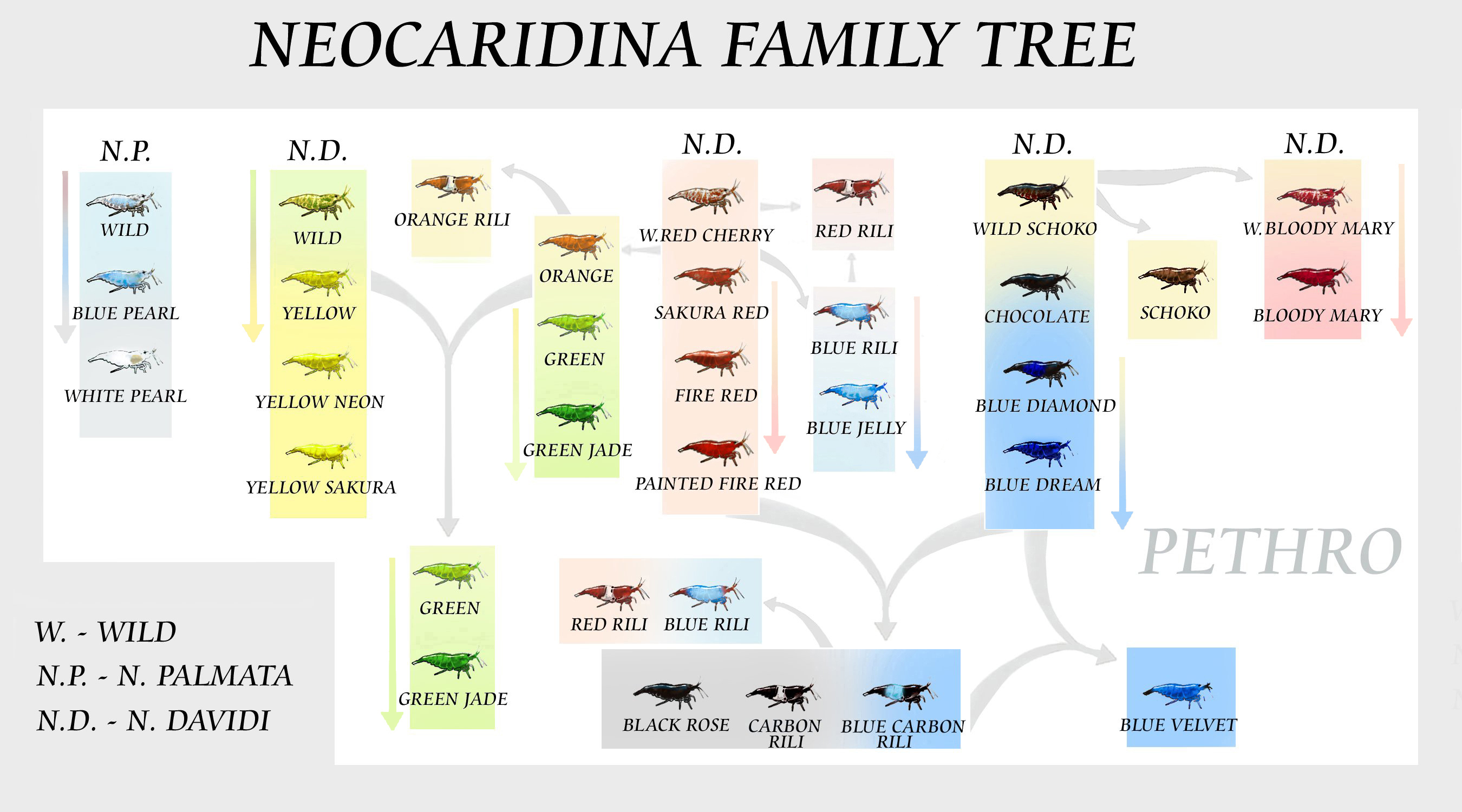 Drzewo genealogiczne ras ozdobnych krewetek z rodzaju neocaridina. Neocaridina family tree.